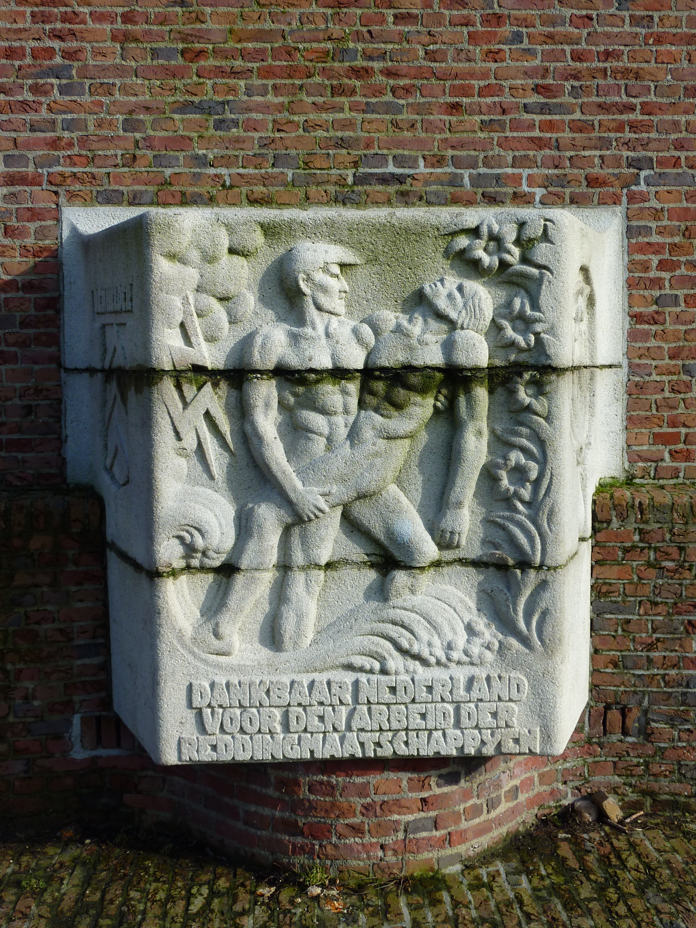 Den Helder